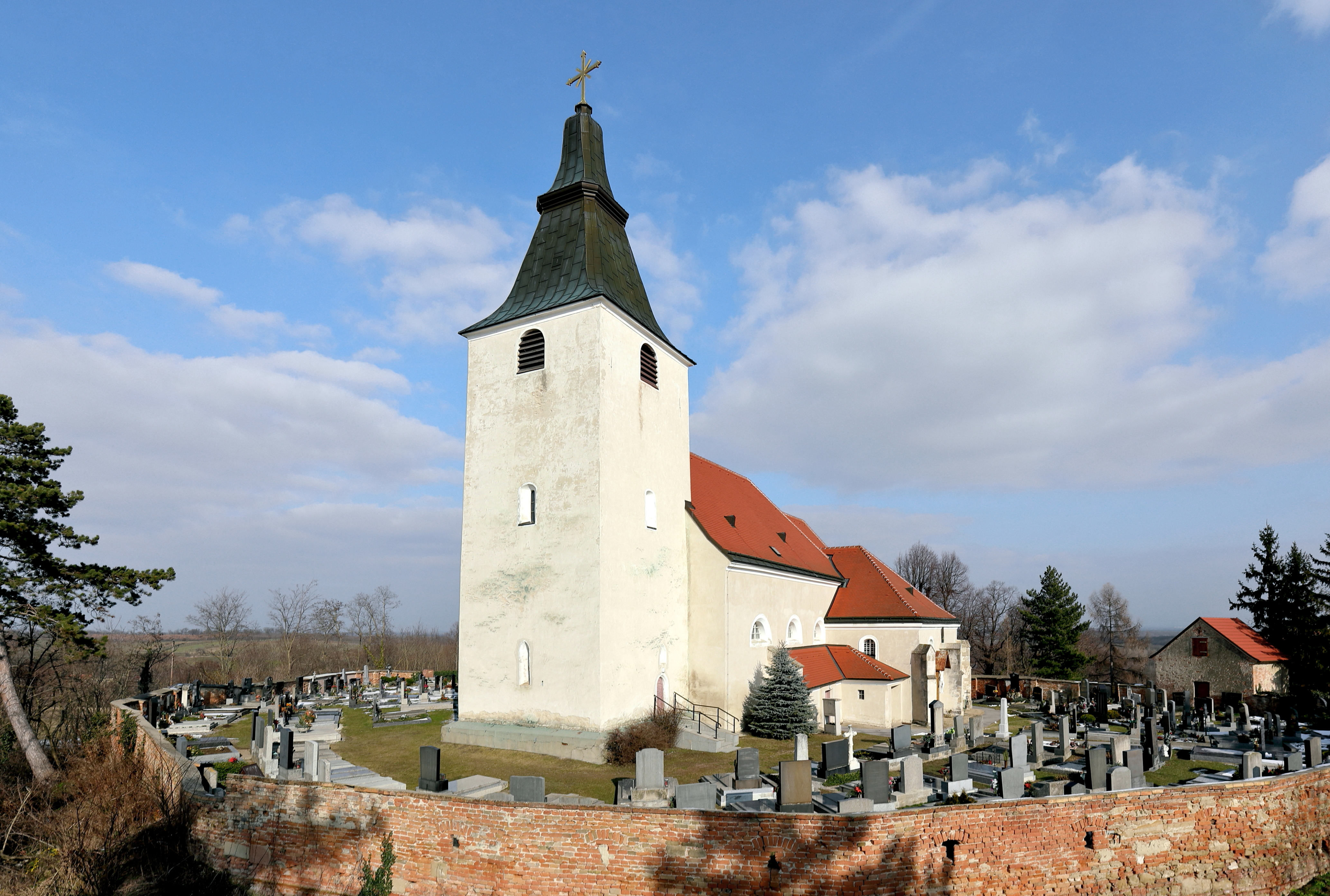 Südwestansicht der röm.-kath. Pfarrkirche hl. Georg in Stillfried, ein Ortsteil der niederösterreichischen Marktgemeinde Angern an der March. Eine 1669/70 barockisierte, weithin sichtbare ehemalige Wehrkirche mit einem gedrungenen Westturm aus dem 13. Jahrhundert und Ringmauer.